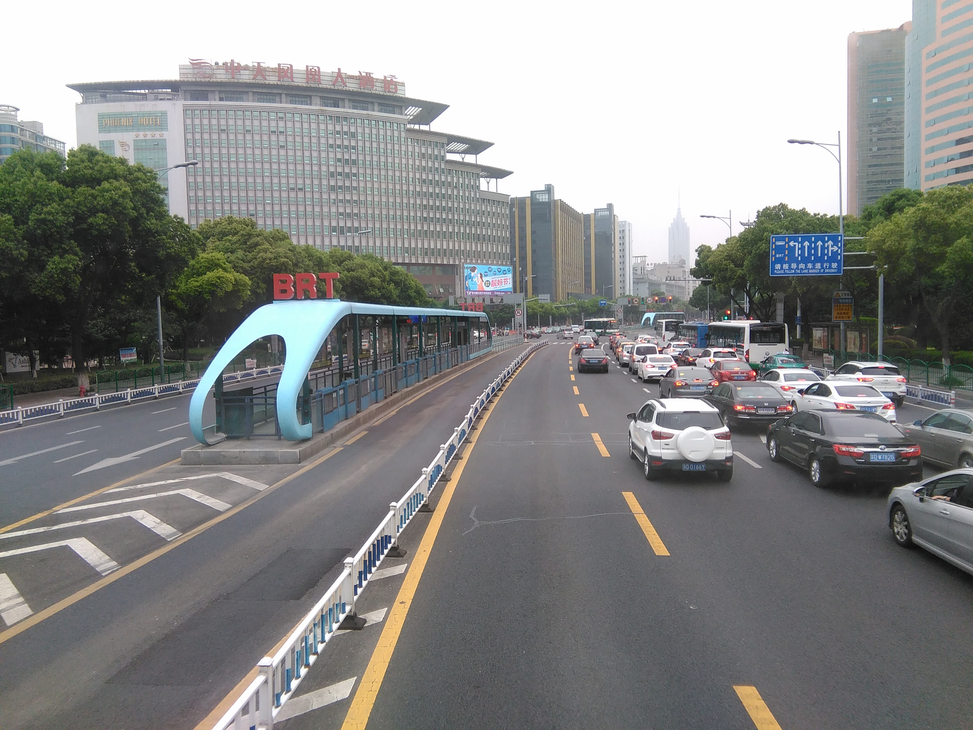 通江路汉江路BRT站台